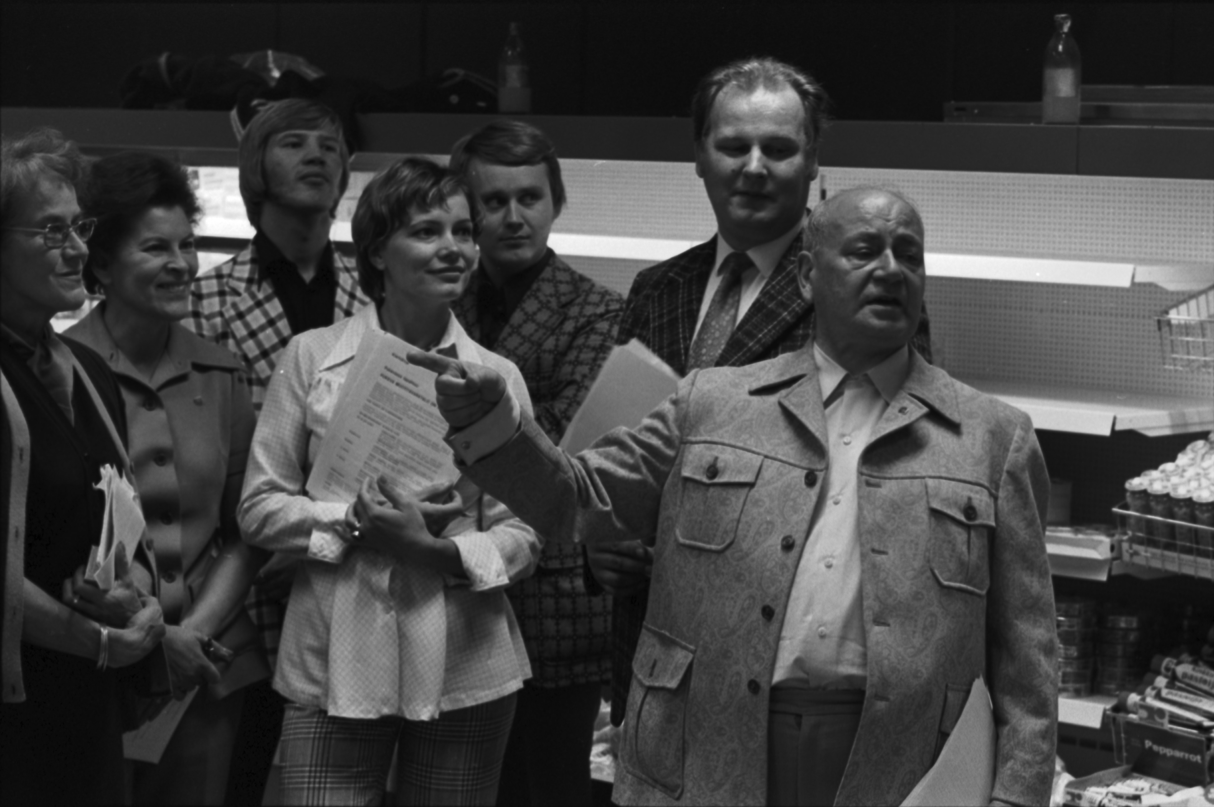 Pukevan uudistunut tavaratalo laajennusosan valmistuttua. Kauppaneuvos Ruben Jaari sekä tavaratalon henkilökuntaa.